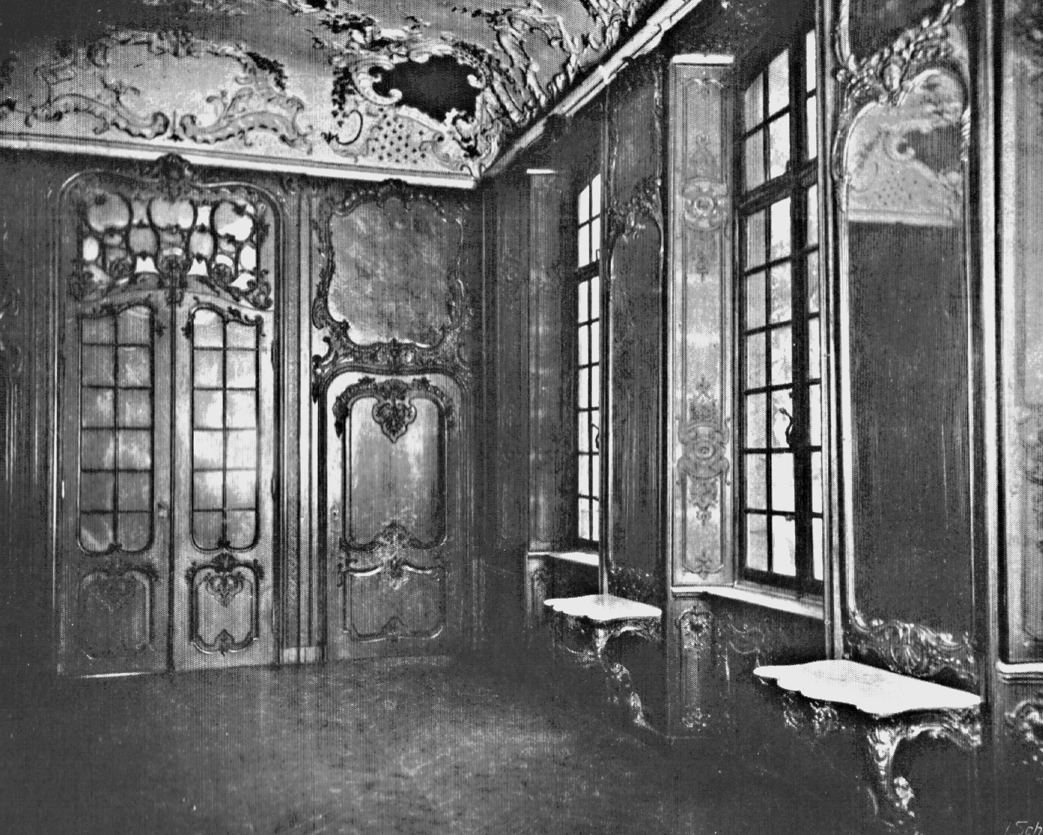 Innenansicht des Gartenhauses Mantels nach der Translozierung auf den Lousberg 1907